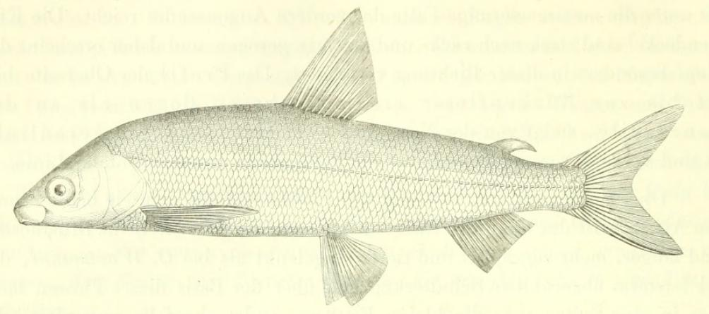 Abbildung eines Kilches (Coregonus acronius = Syn. Coregonus gutturosus) aus: Die Süsswasserfische der Östreichischen Monarchie mit Rücksicht auf die angrenzenden Länder von Rudolf Kner (1810–1869) und Johann Jakob Heckel (1790-1857); 1858